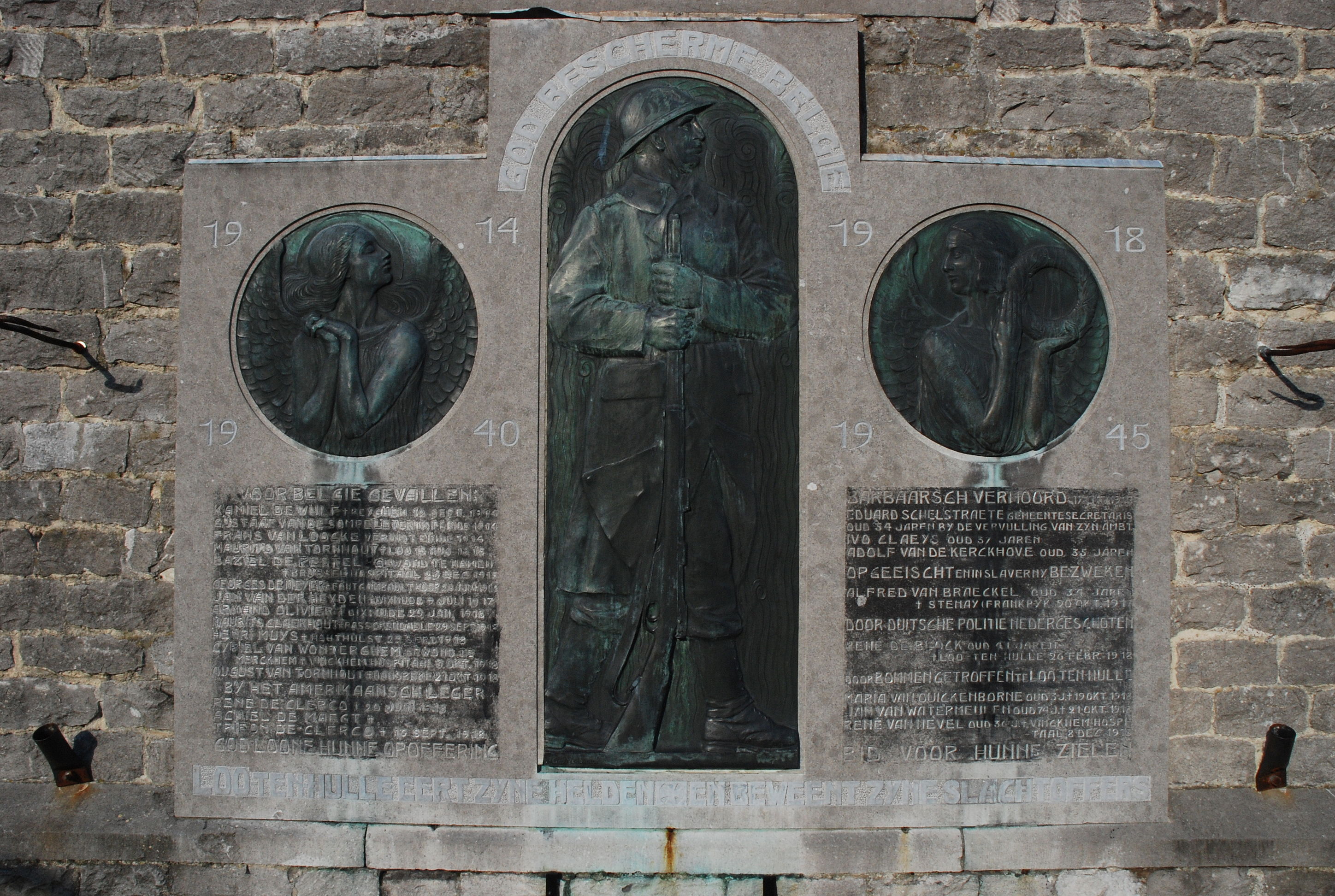 Oorlogsmonument tegen de De Heilig-Kruiskerk te Lotenhulle, België